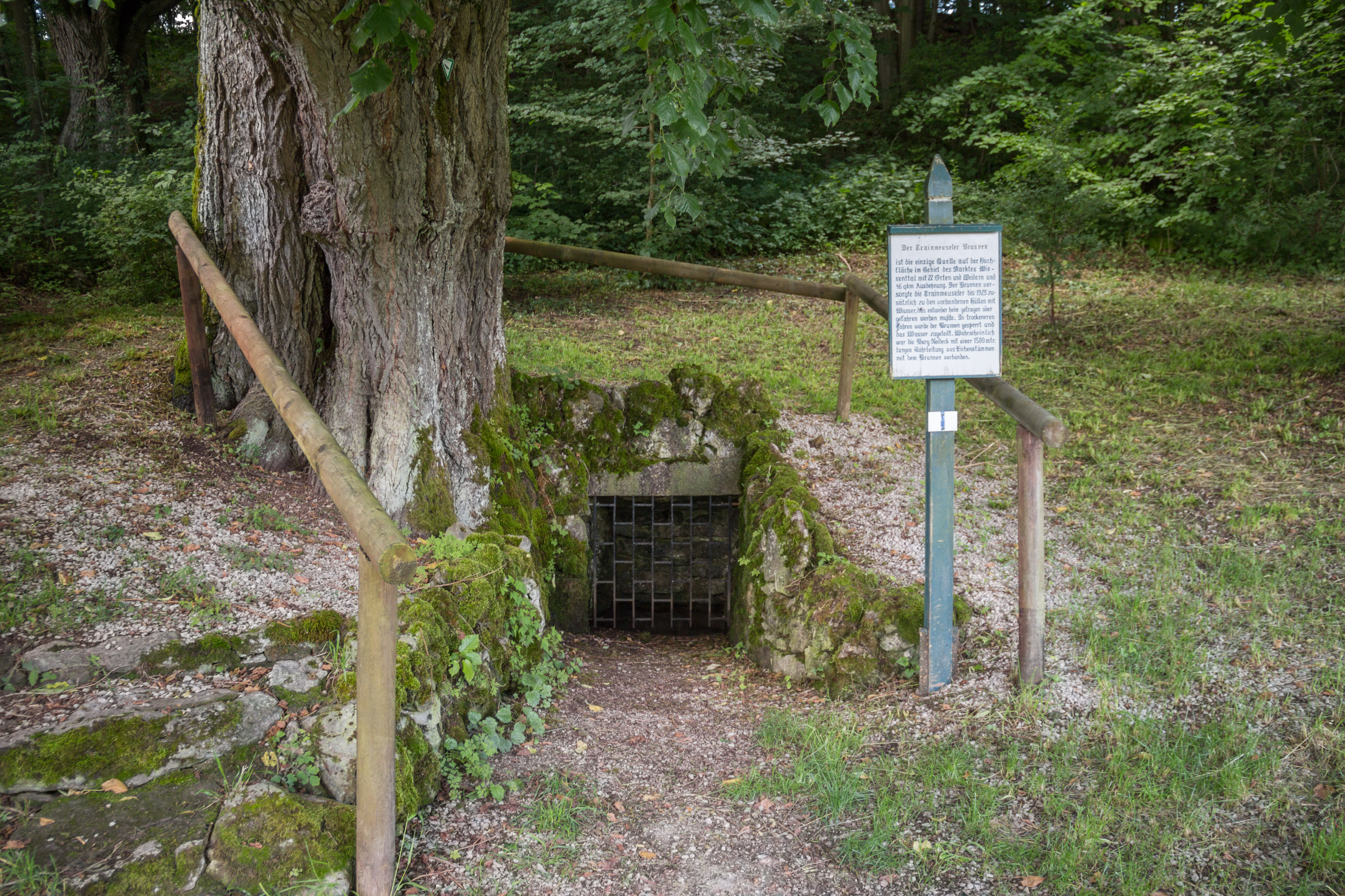 Trainmeuseler Brunnen, Schichtquelle, Naturdenkmal, Naturpark und Landschaftsschutzgebiet Fränkische Schweiz-Veldensteiner Forst